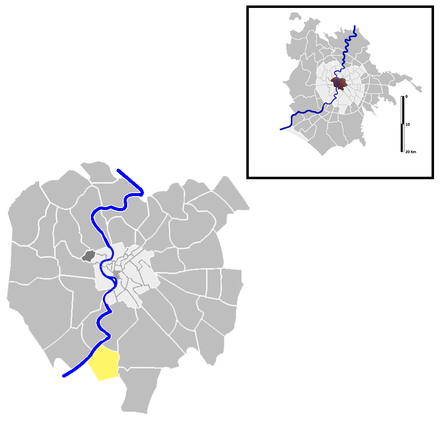 Europa